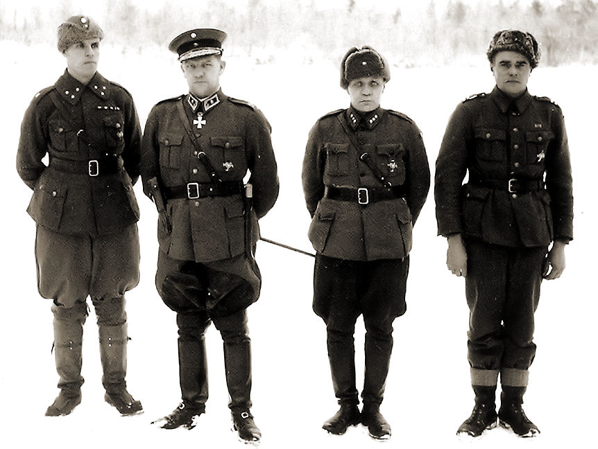 Mannerheim-ristin ritarit: vasemmalta kapteeni Eero Kivelä, kenraalimajuri Aaro Pajari, kapteeni Juho Pössi, alikersantti Vilho Rättö.